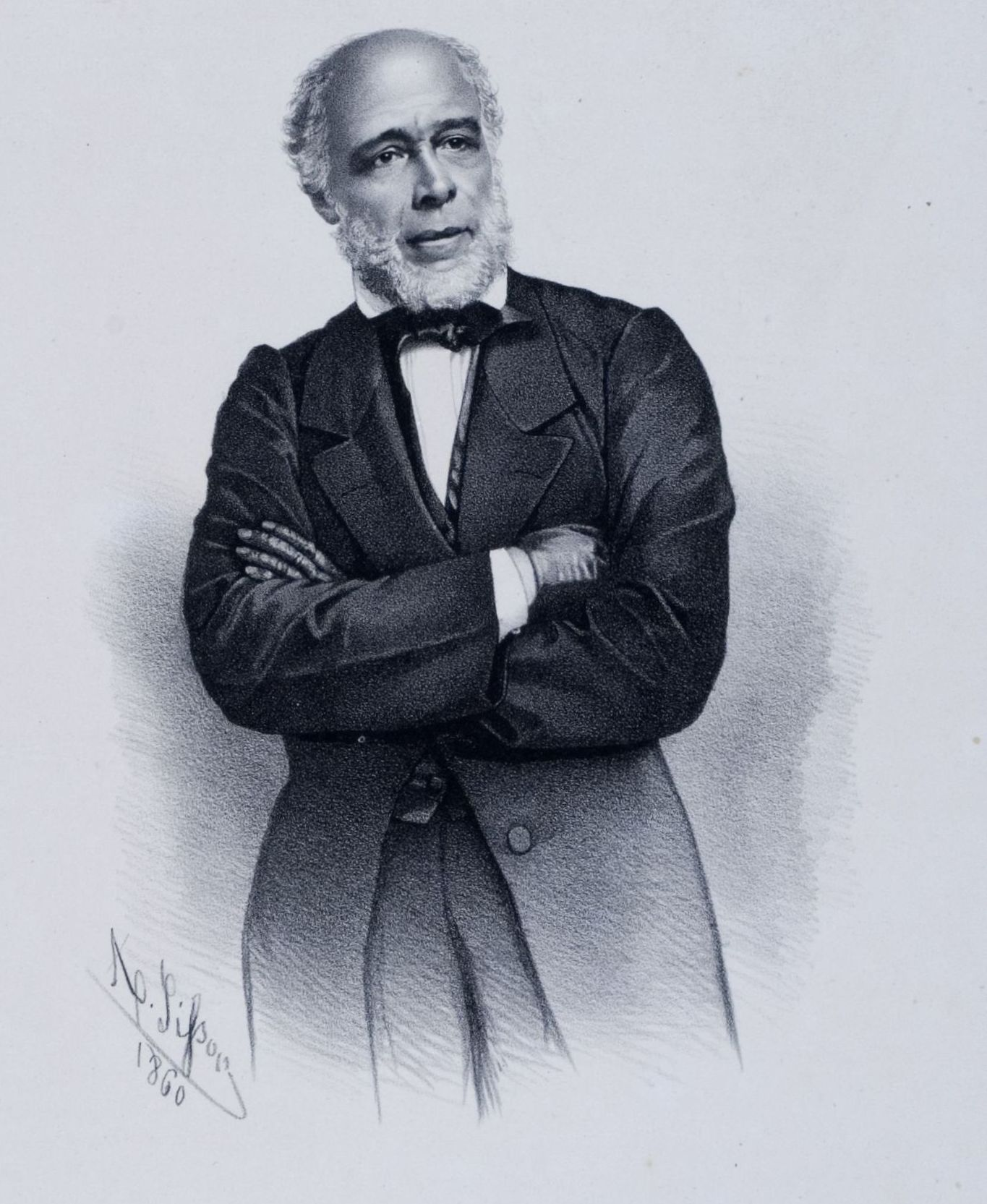 Litografia em preto e branco